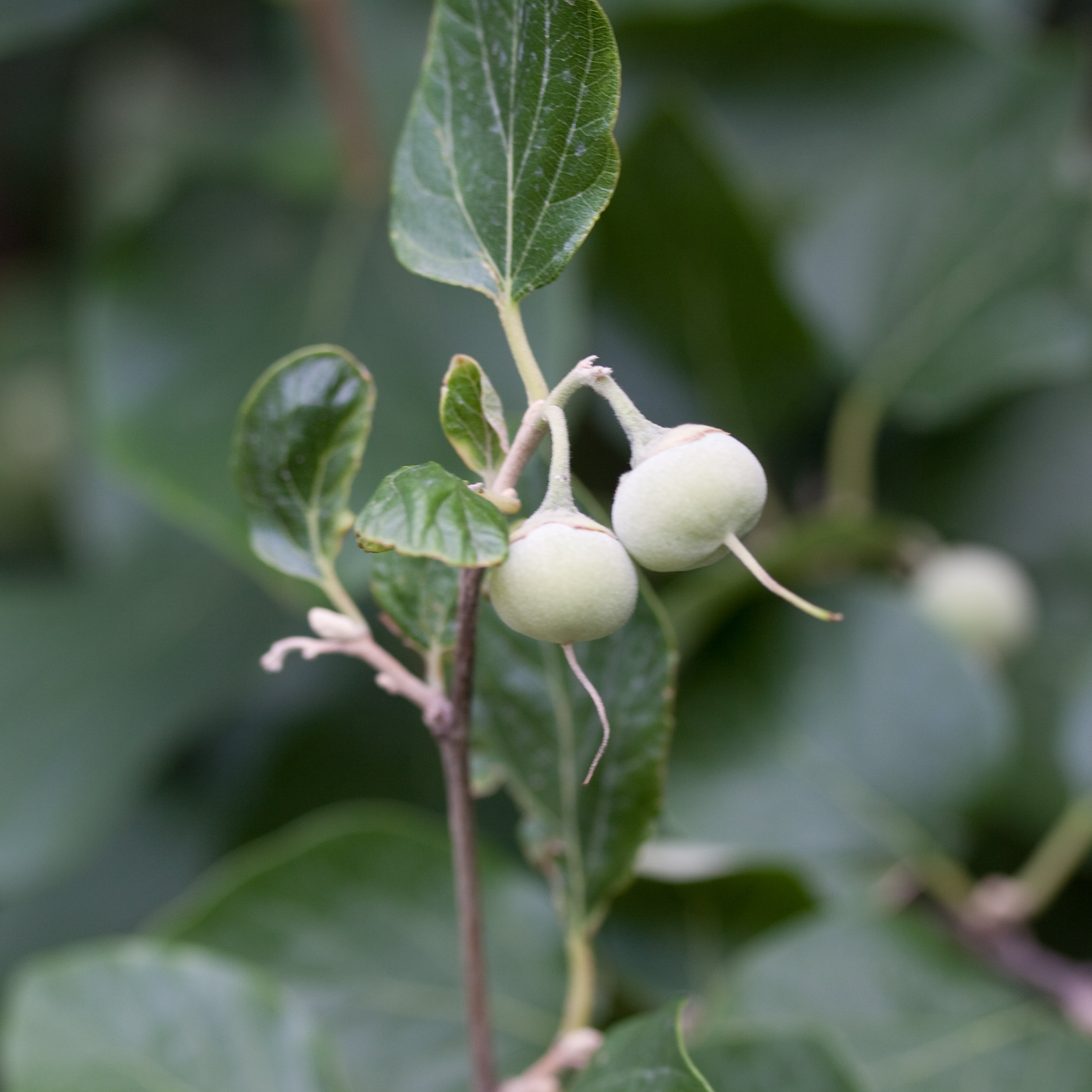 Fruit de Styrax officinalis - Jardin des Plantes - Paris - France